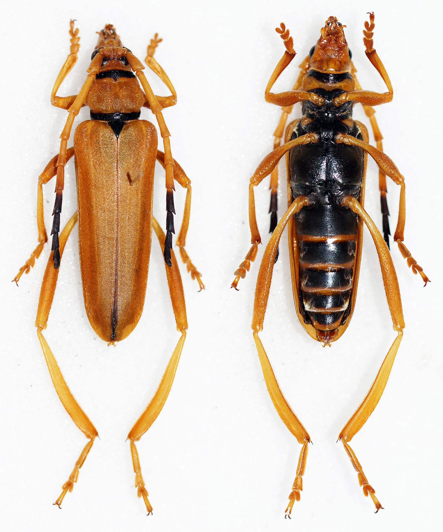 Vives & Bentanachs,2005 Sex: ? Data: 14-05-11- Crocker Range - Sabah - Malaysia Size: 32mm